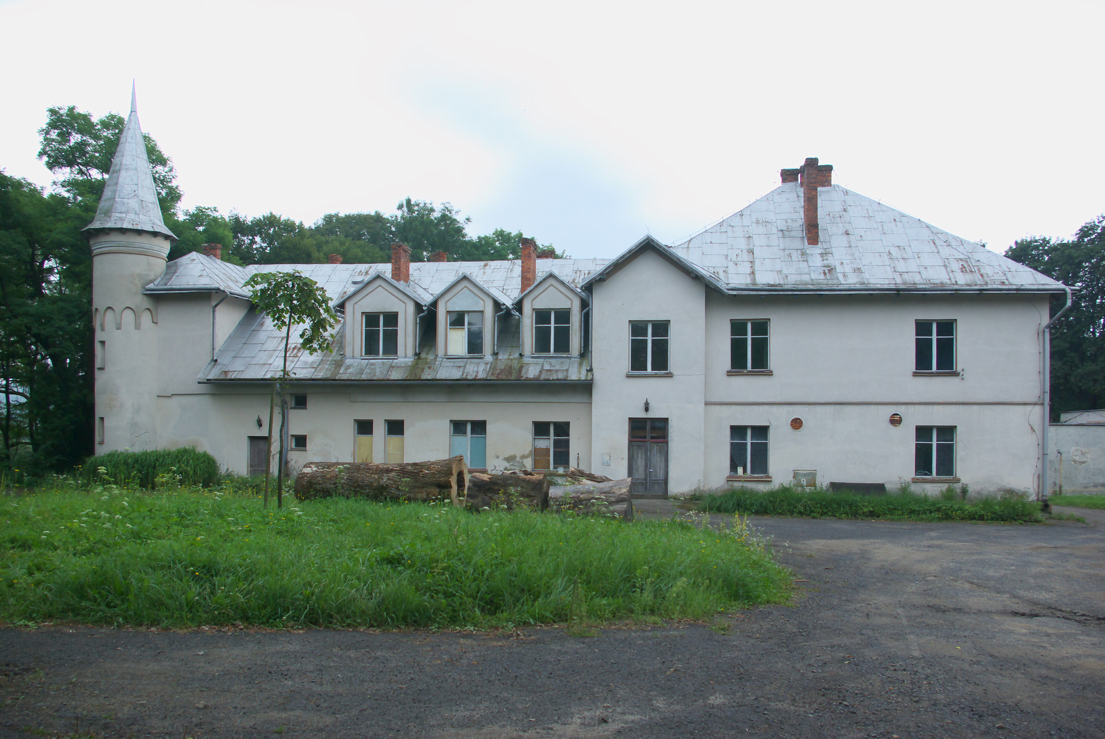 Budynek dworski w Załużu.